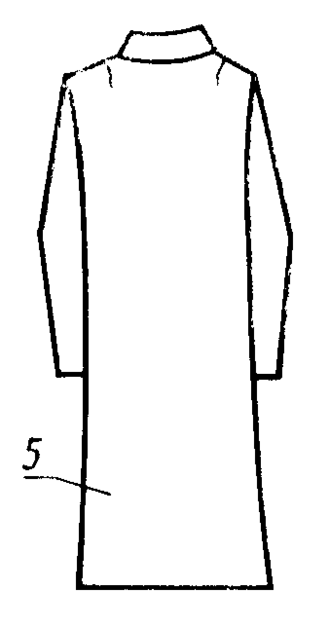 Изображение из ГОСТ 22977-89 (СТ СЭВ 6484-88) — Детали швейных изделий. Термины и определения.